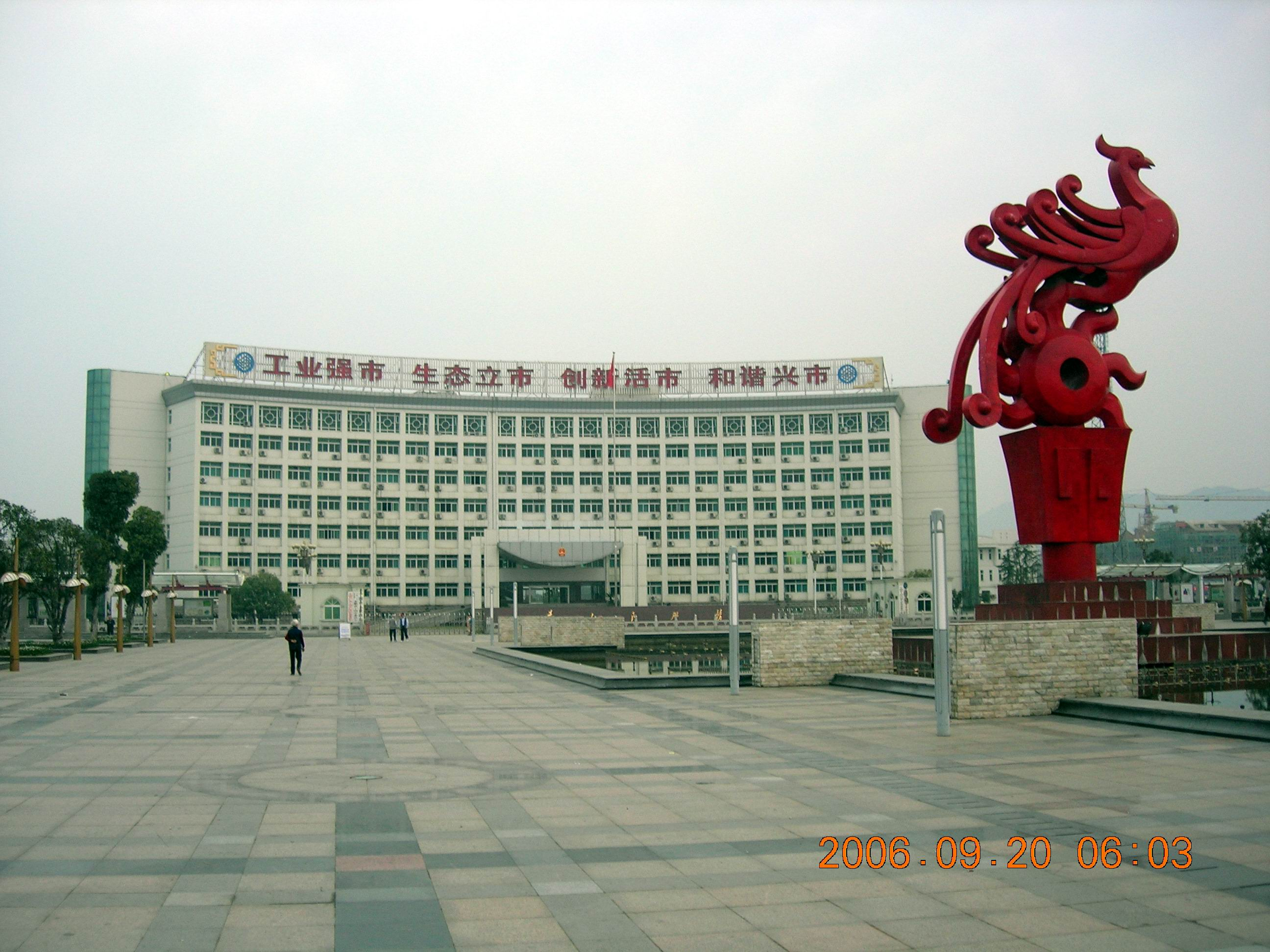 宣城市宁国市政府办公楼-广场